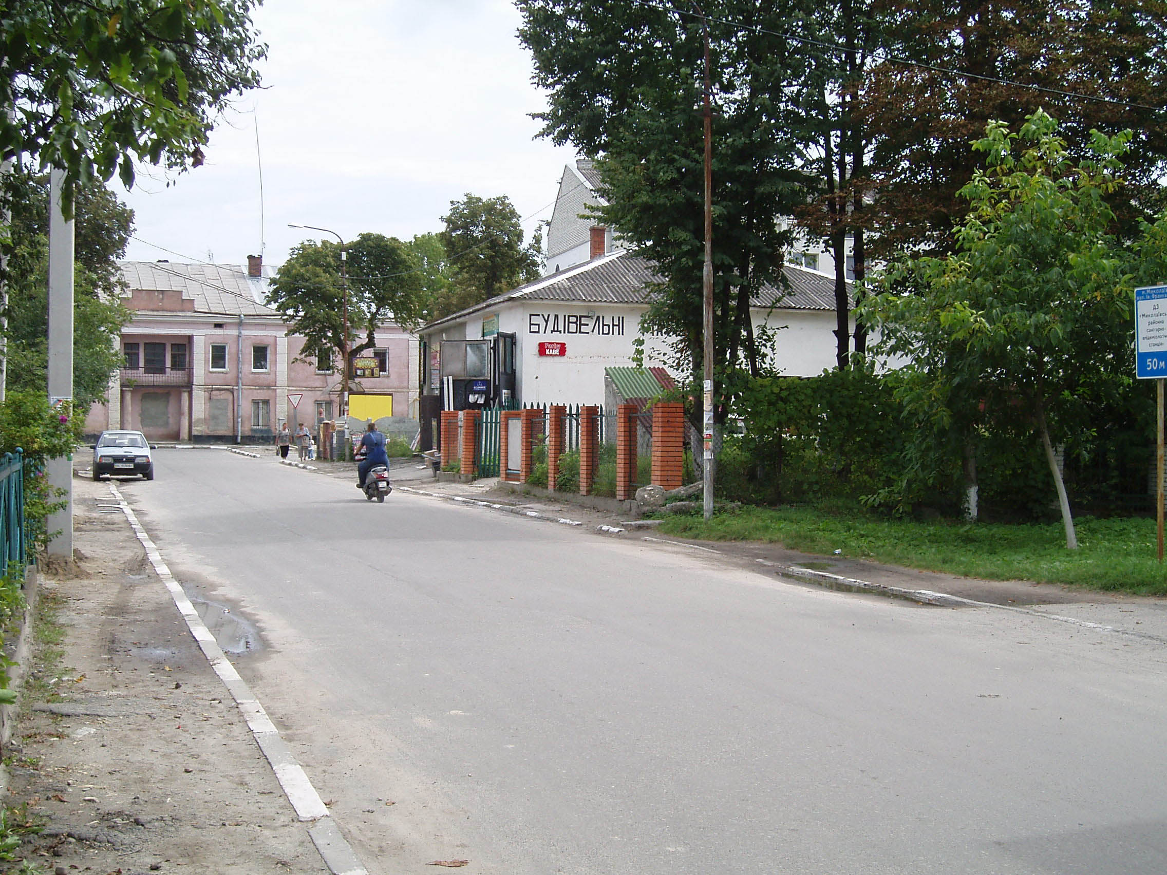 Вулиця Лесі Українки у Миколаєві Львівської області.